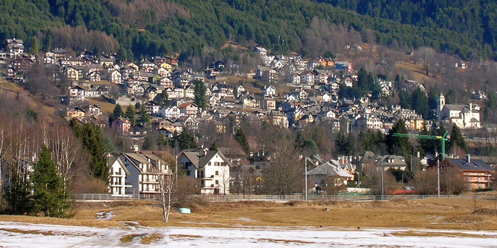 Panorama di Toceno (VB) da Santa Maria Maggiore